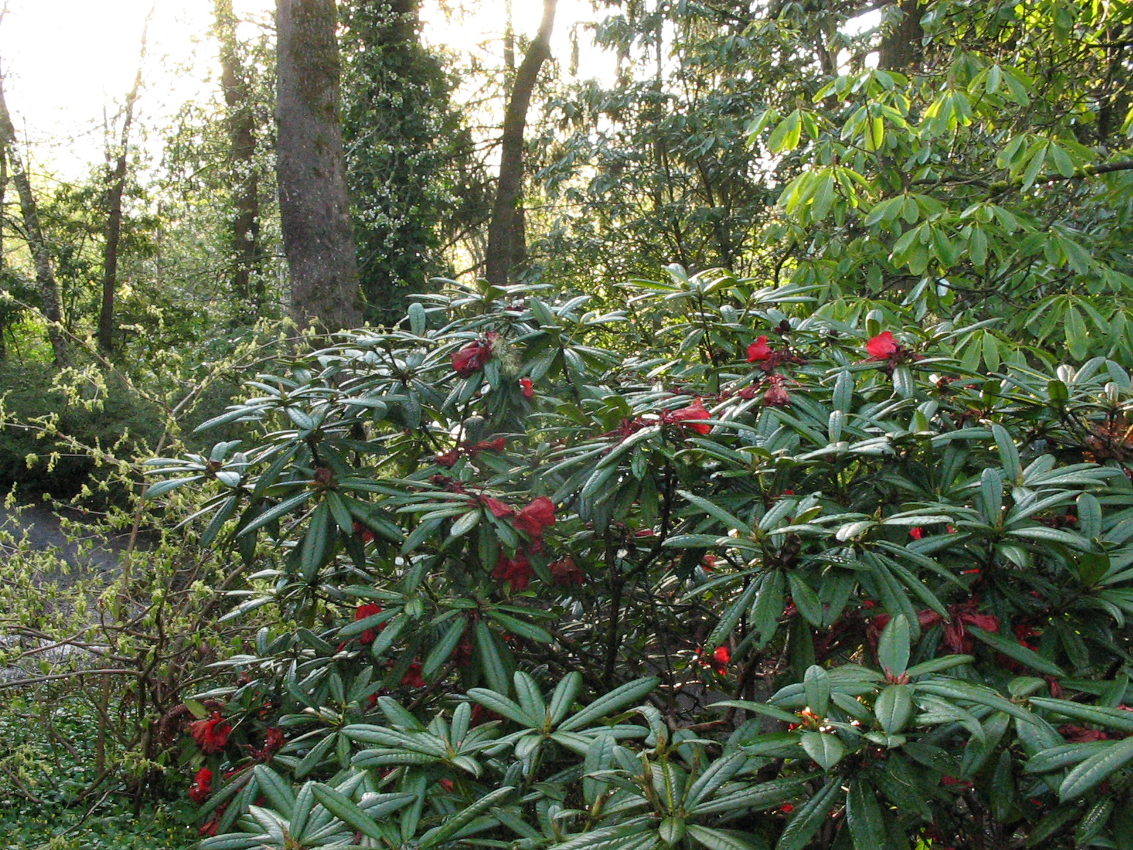 Hendricks Park, Eugene, Oregon